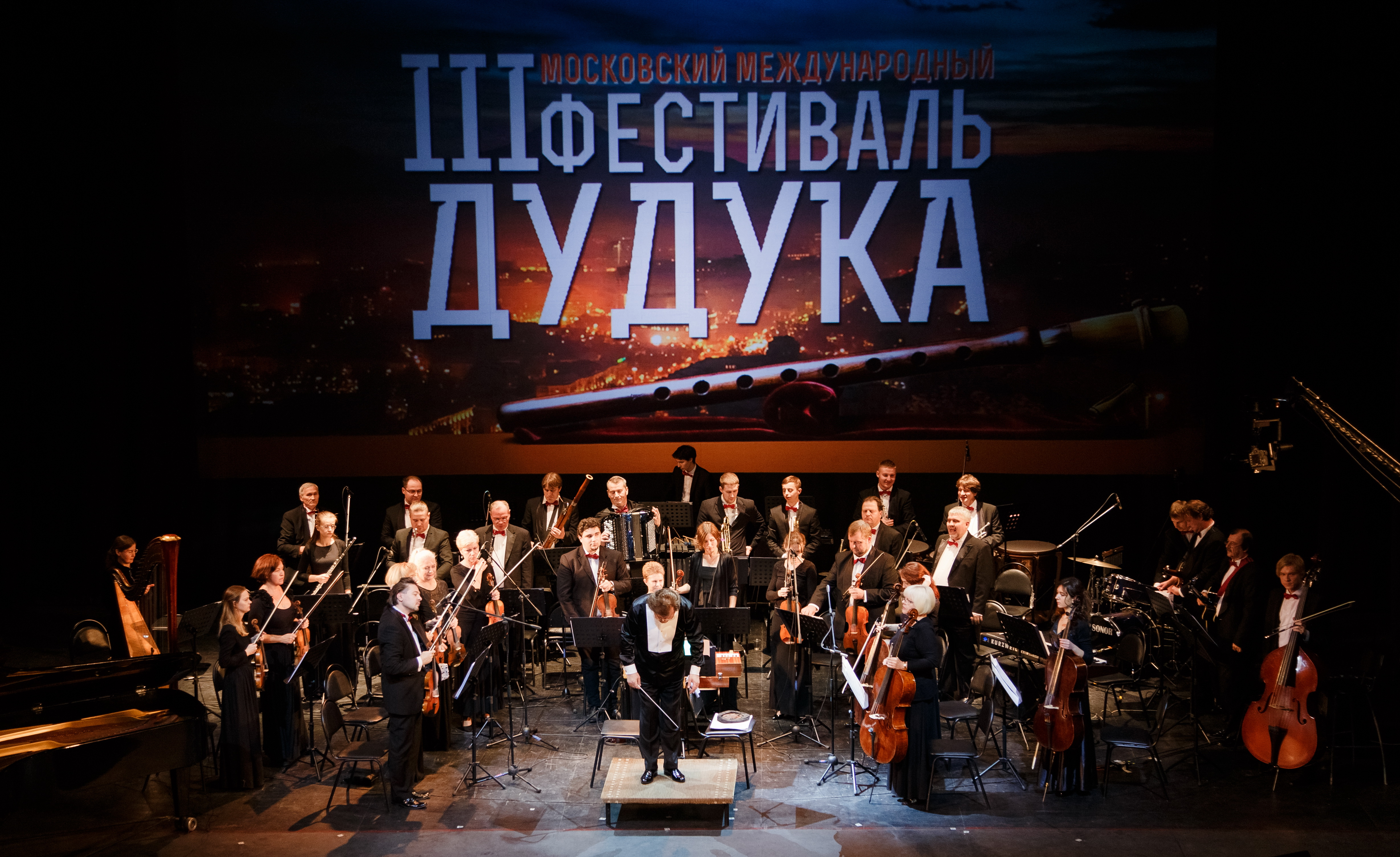 «Բոյան» ռուսական պետական ակադեմիական երգչախումբ